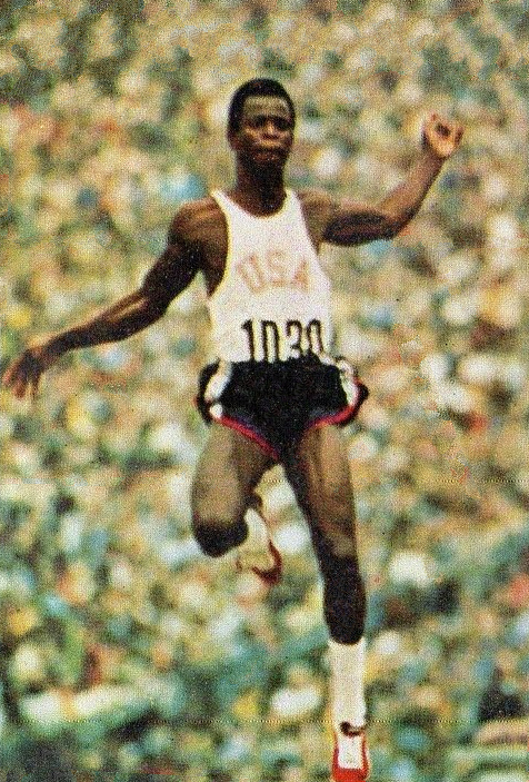 CAMPIONI dello SPORT 1973/74-Figurina n.41- WILLIAMS - USA -ATL.LEGGERA